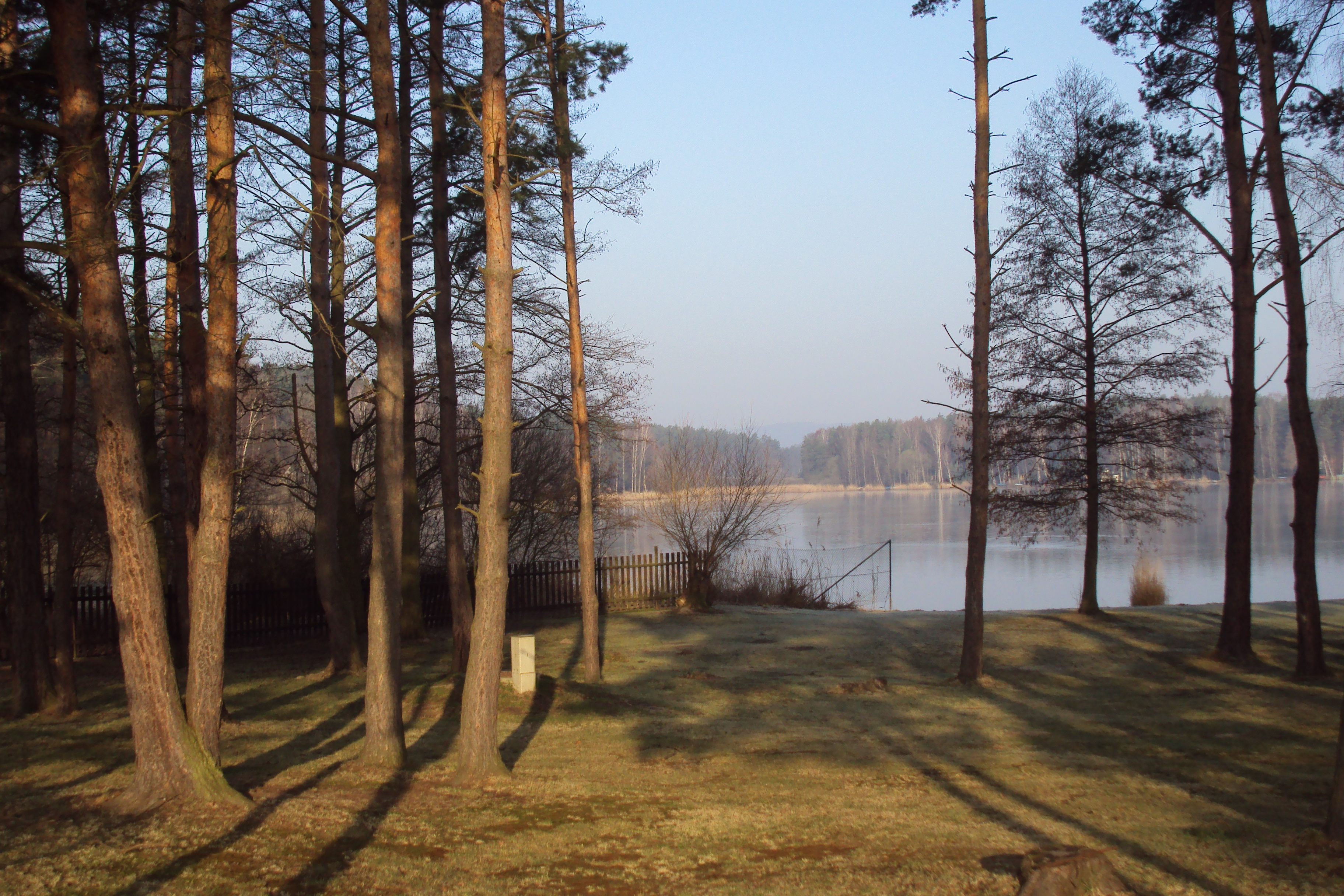 Milčanský rybník na katastru městyse Holany, součást Holanských rybníků